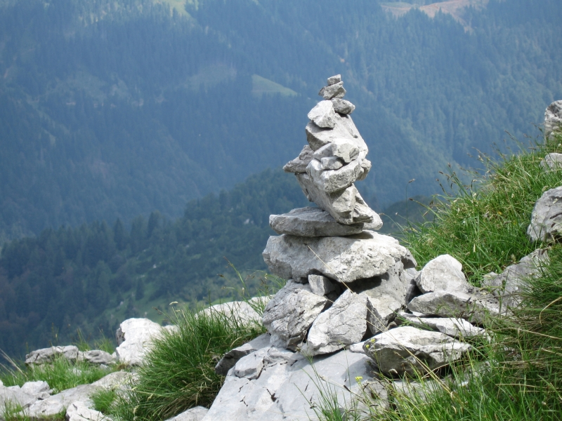 Možic. Označba planinske poti.